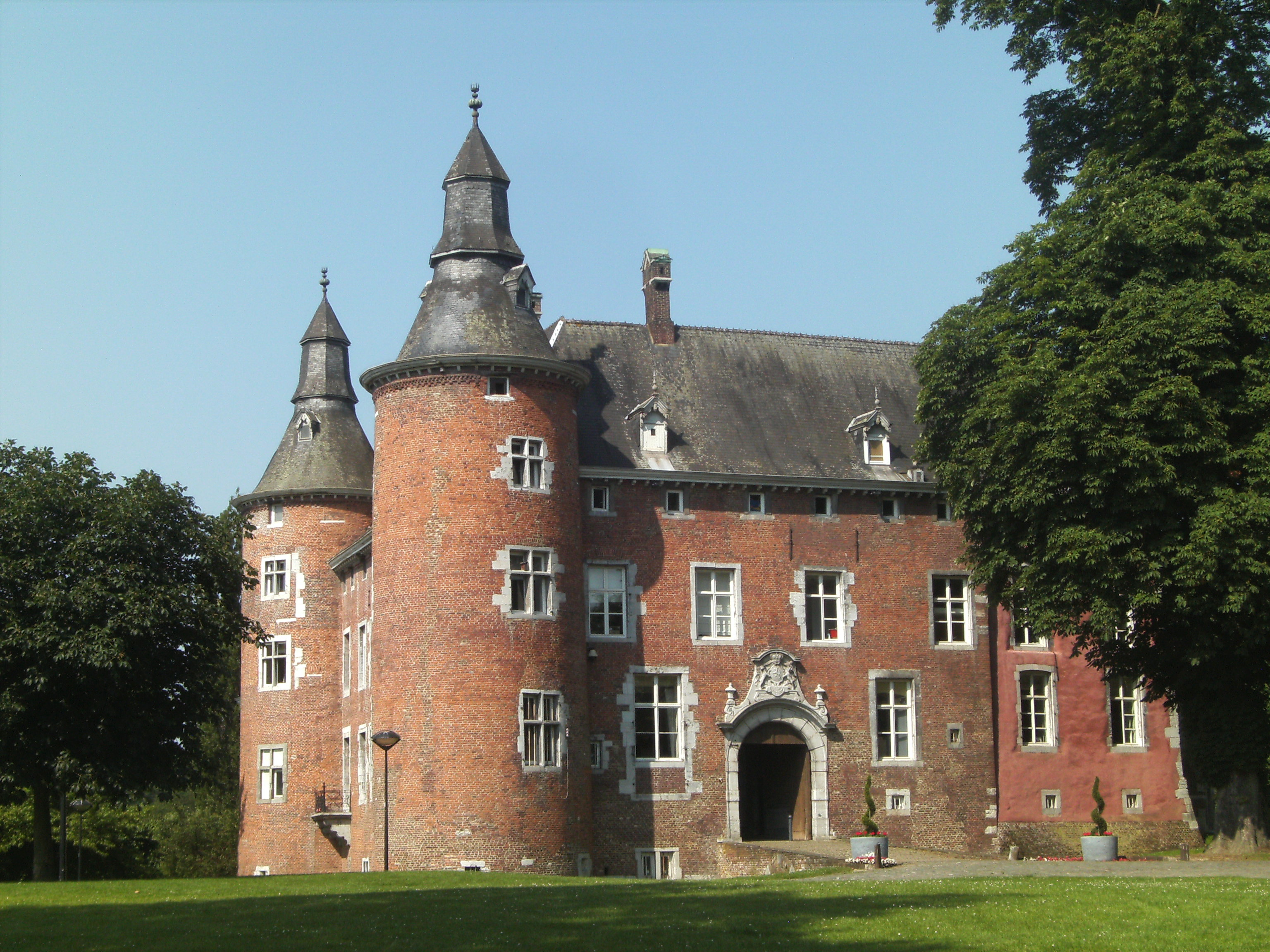 Château de Monceau-sur-Sambre (Charleroi - Belgique)